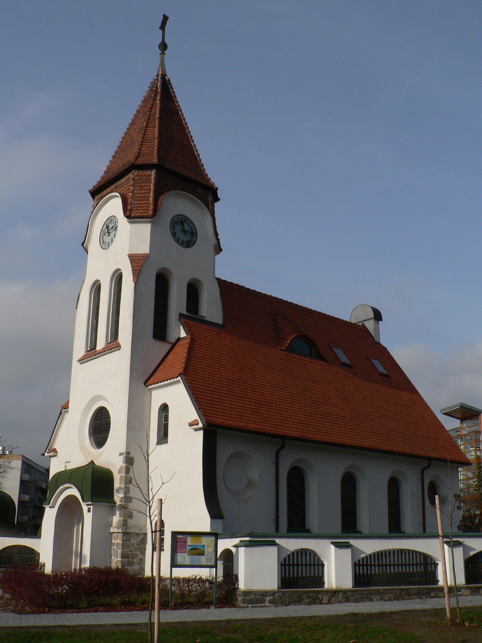 Kostel svatého Jana Evangelisty (Šumperk)